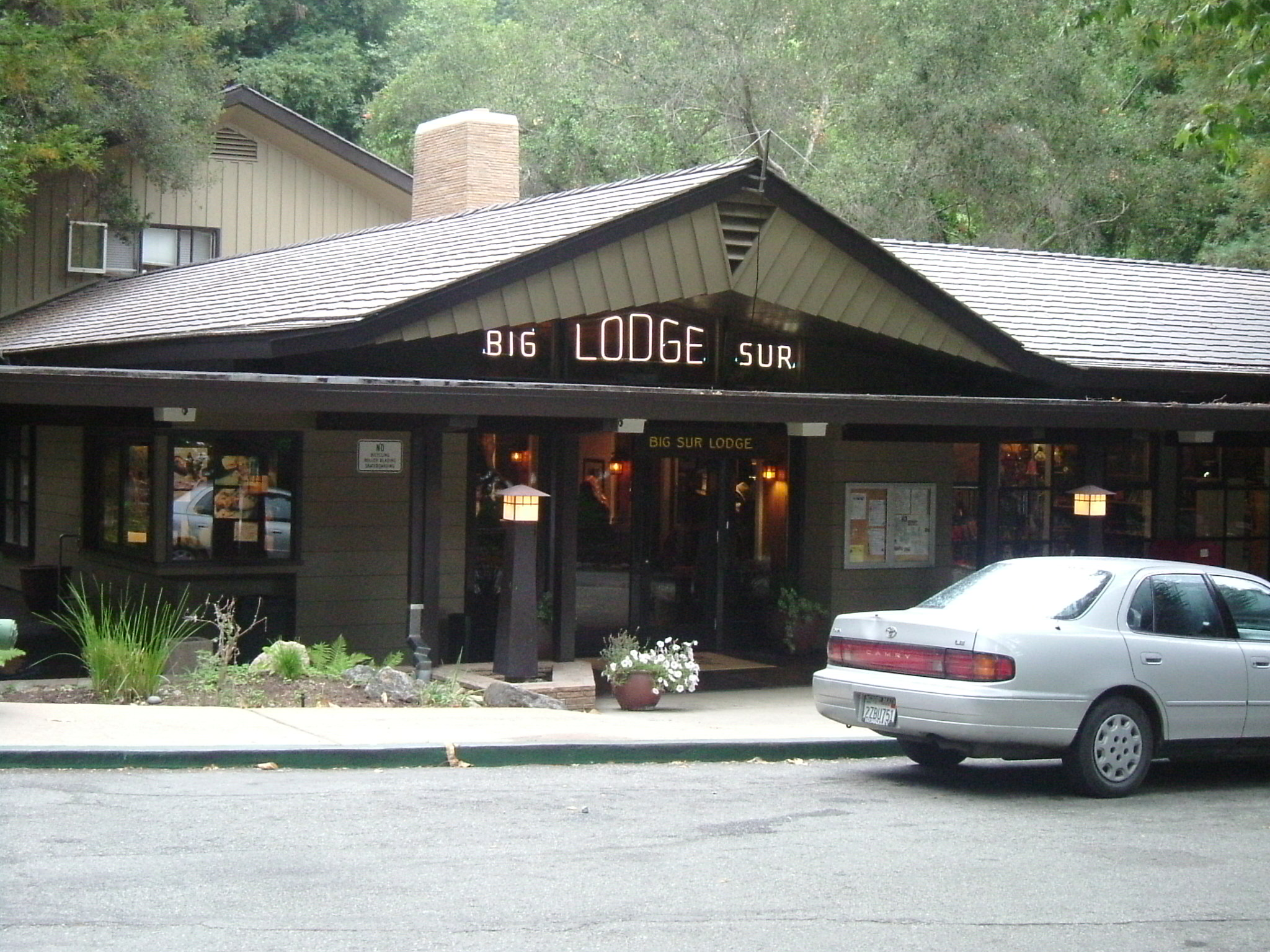 Big Sur